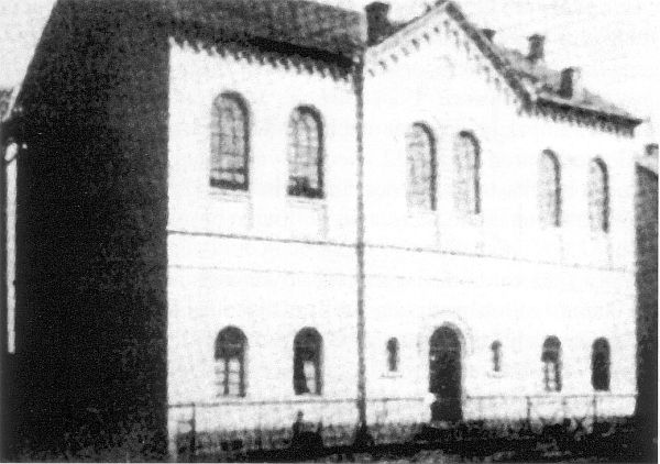 Die ehemalige Synagoge in Illingen (Saar).